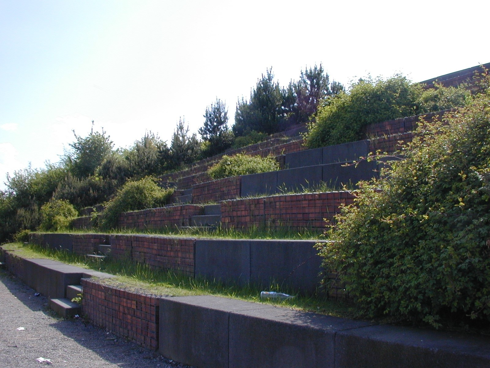 Deutschland, Bochum, Westpark